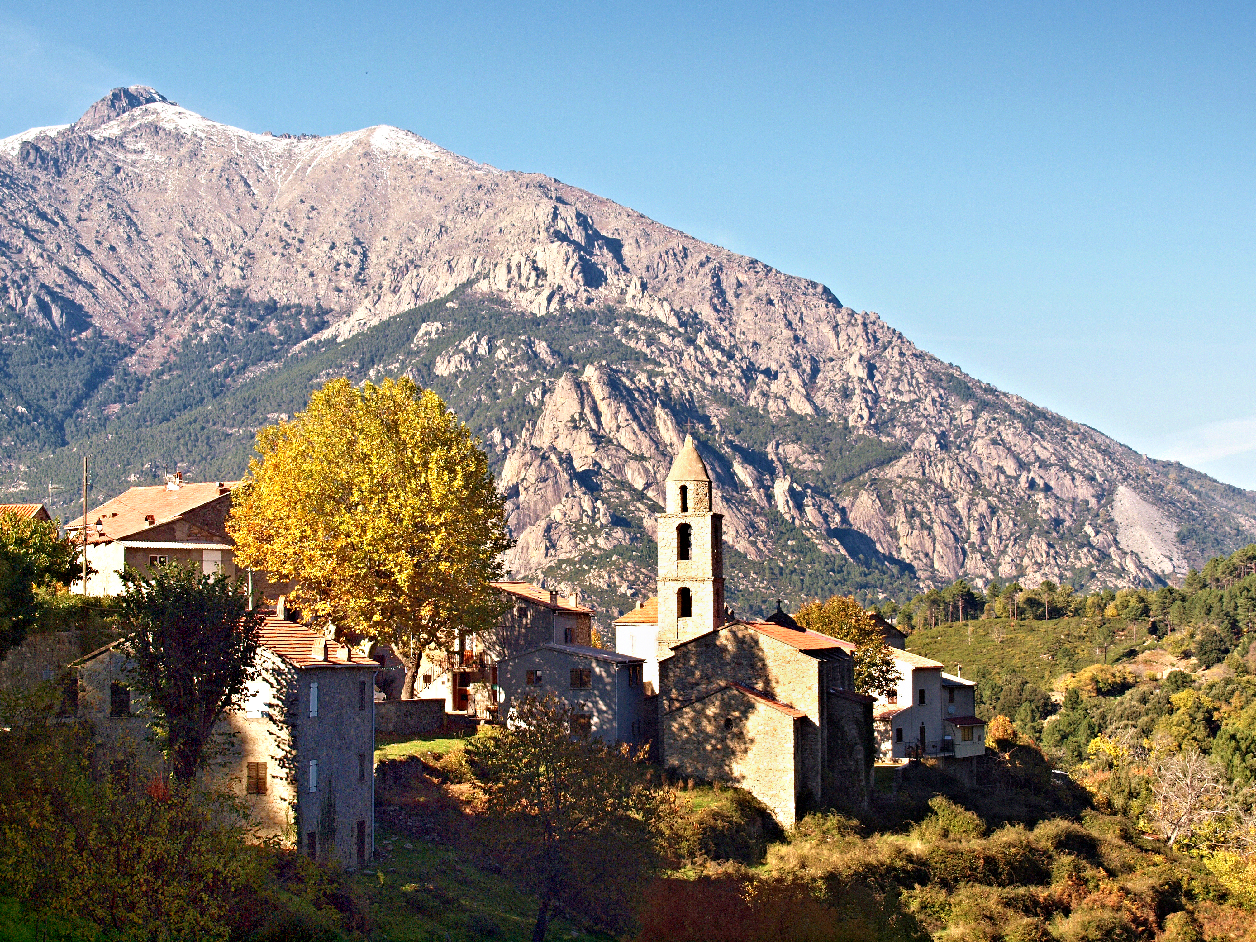 Monte Cardo - Vue depuis Muracciole